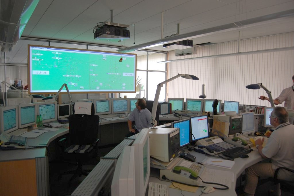 Die S-Bahn-Betriebszentrale in Altona.Betriebszentrale Altona